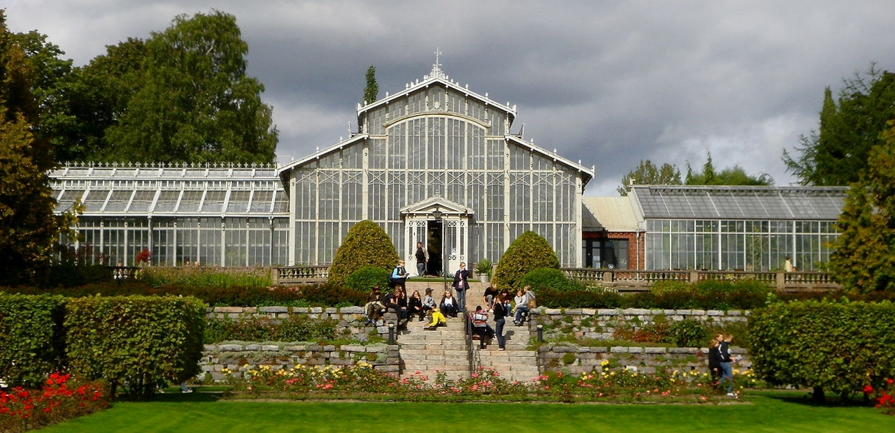 Le Jardin d'hiver d'Helsinki est une serre ouverte au public située à proximité du Parc Eläintarha au nord de Töölönlahti à Helsinki.